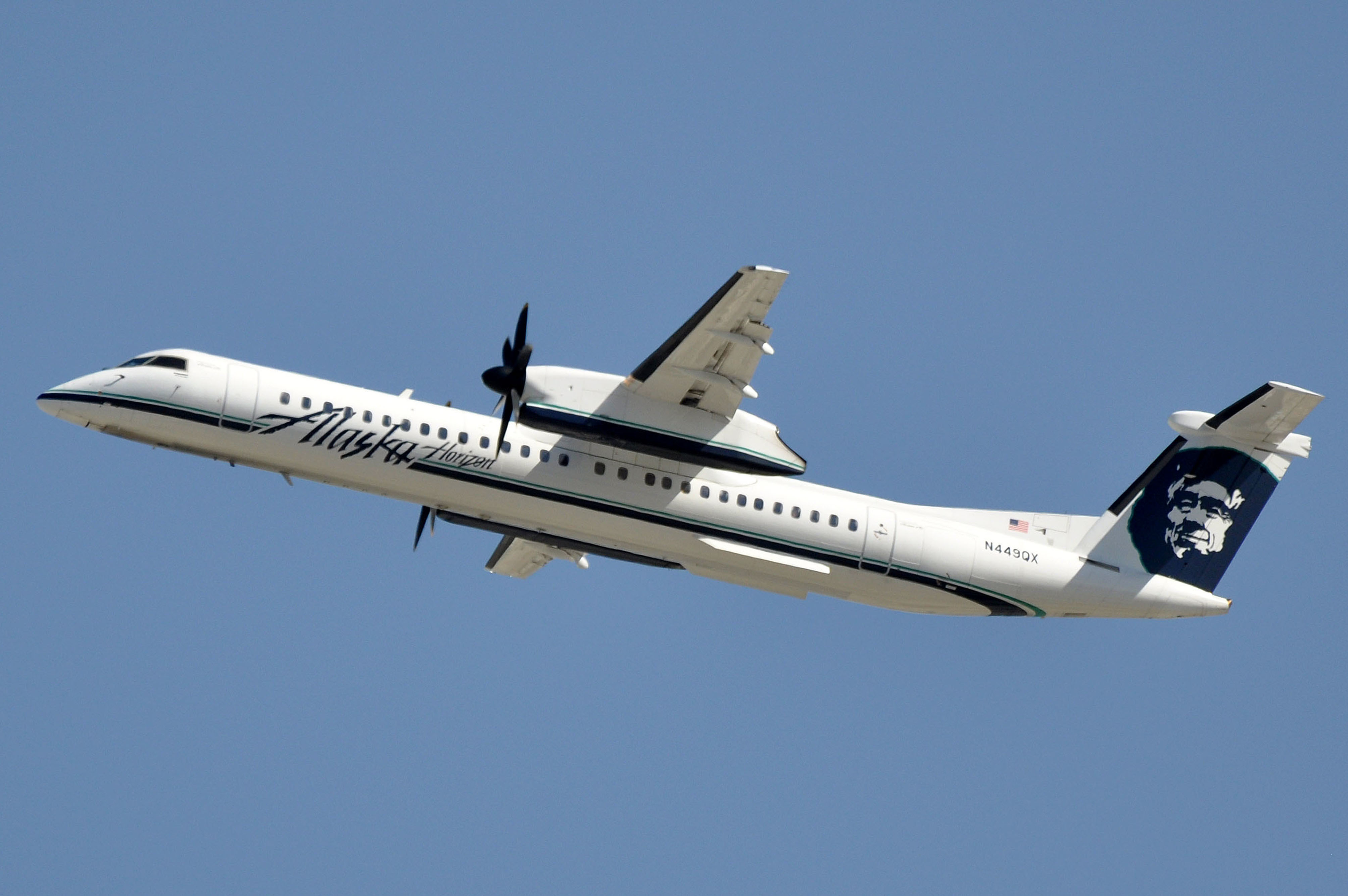 MSN 4410 DHC-8 402 HORIZON AIR / ALASKA AIRLINES LAX AIRPORT